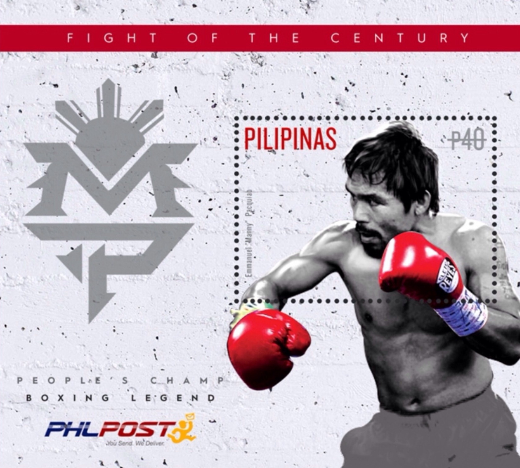 Manny Pacquiao